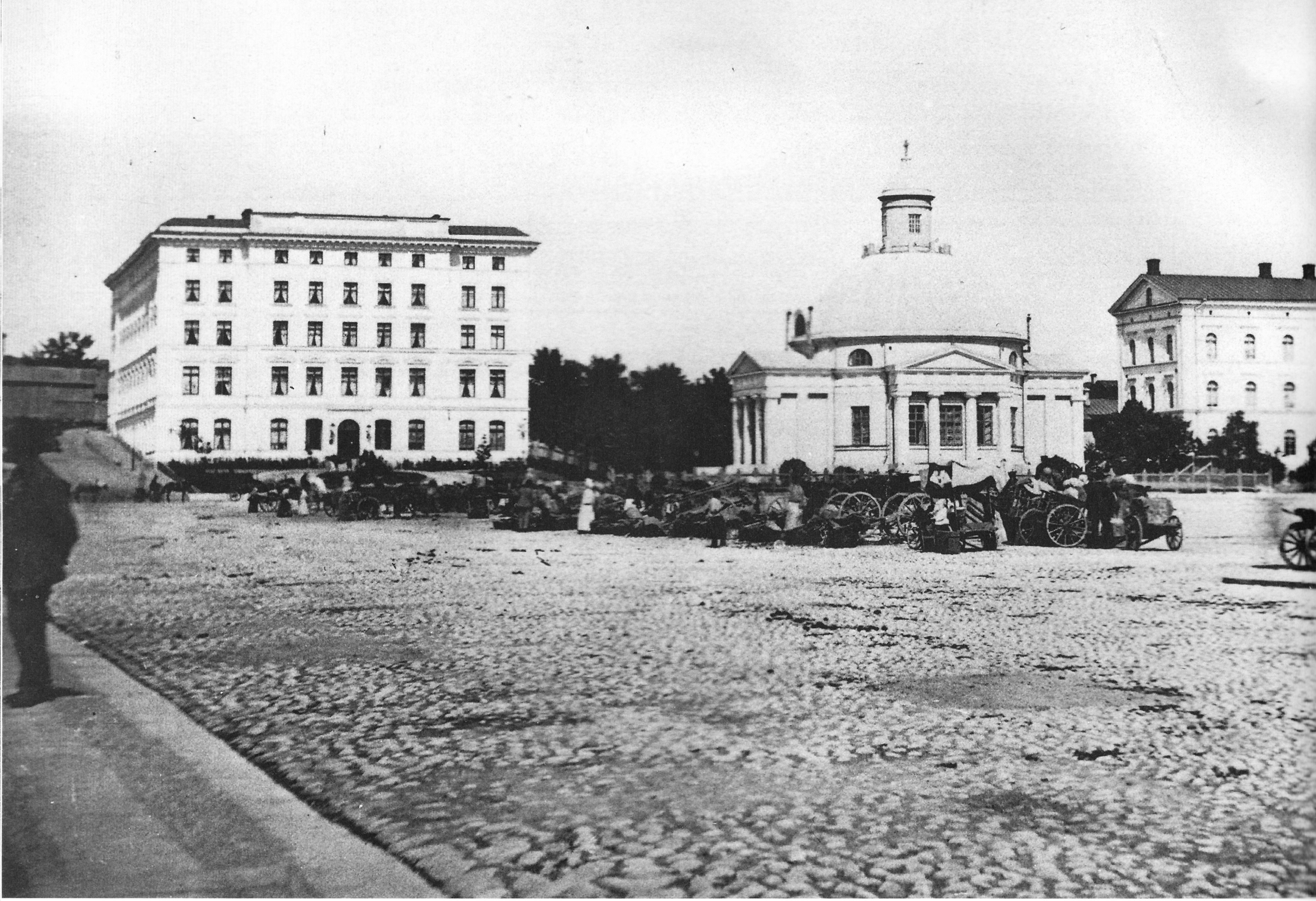 Hotelli Phoenix turussa vuonna 1880